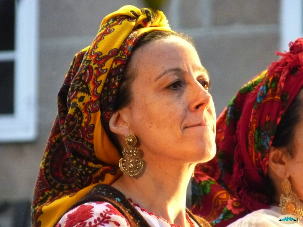 Cantareira, Galicia (Spain)